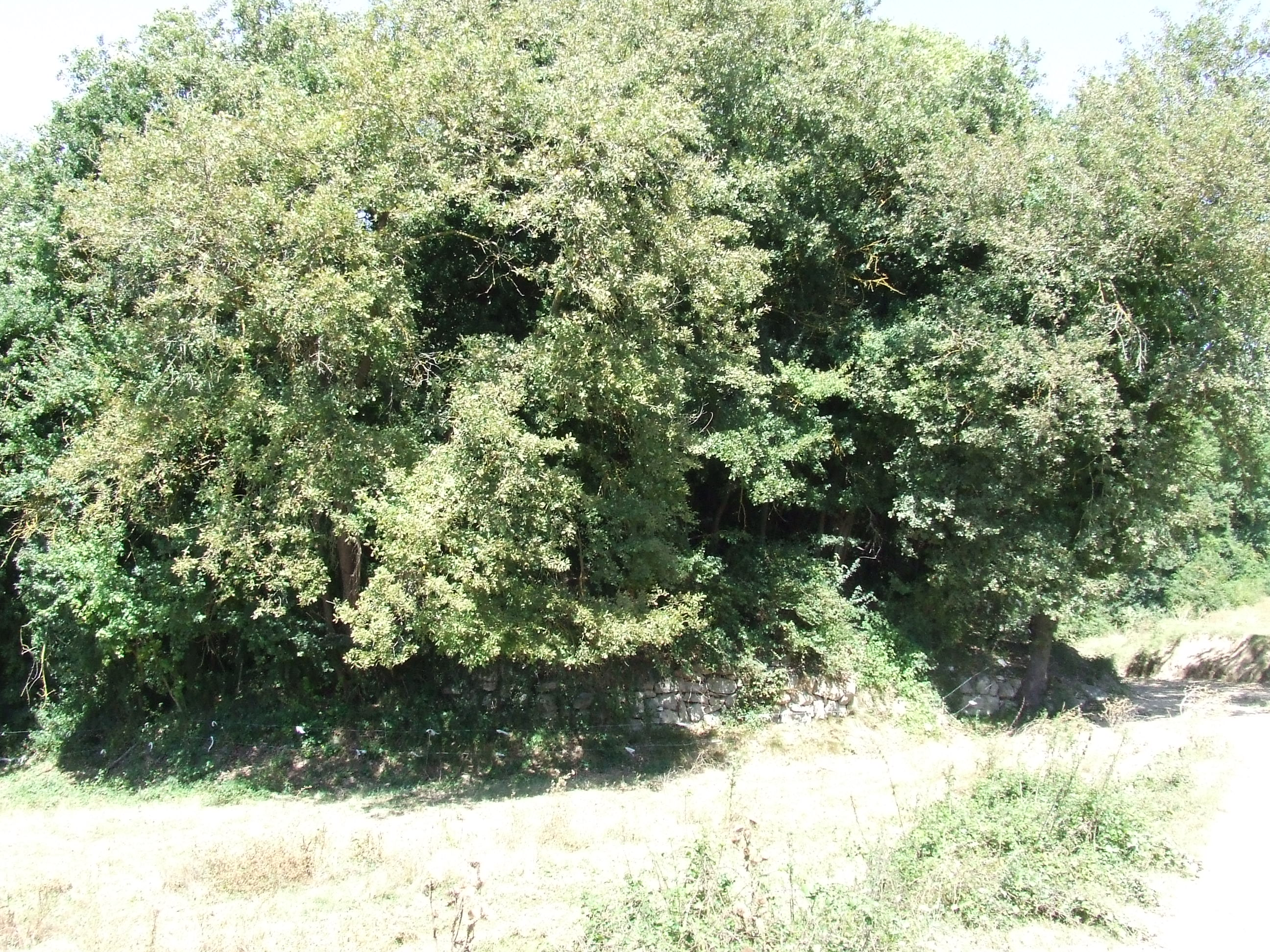 La Poua de la Vileta (Castellcir, Moianès)